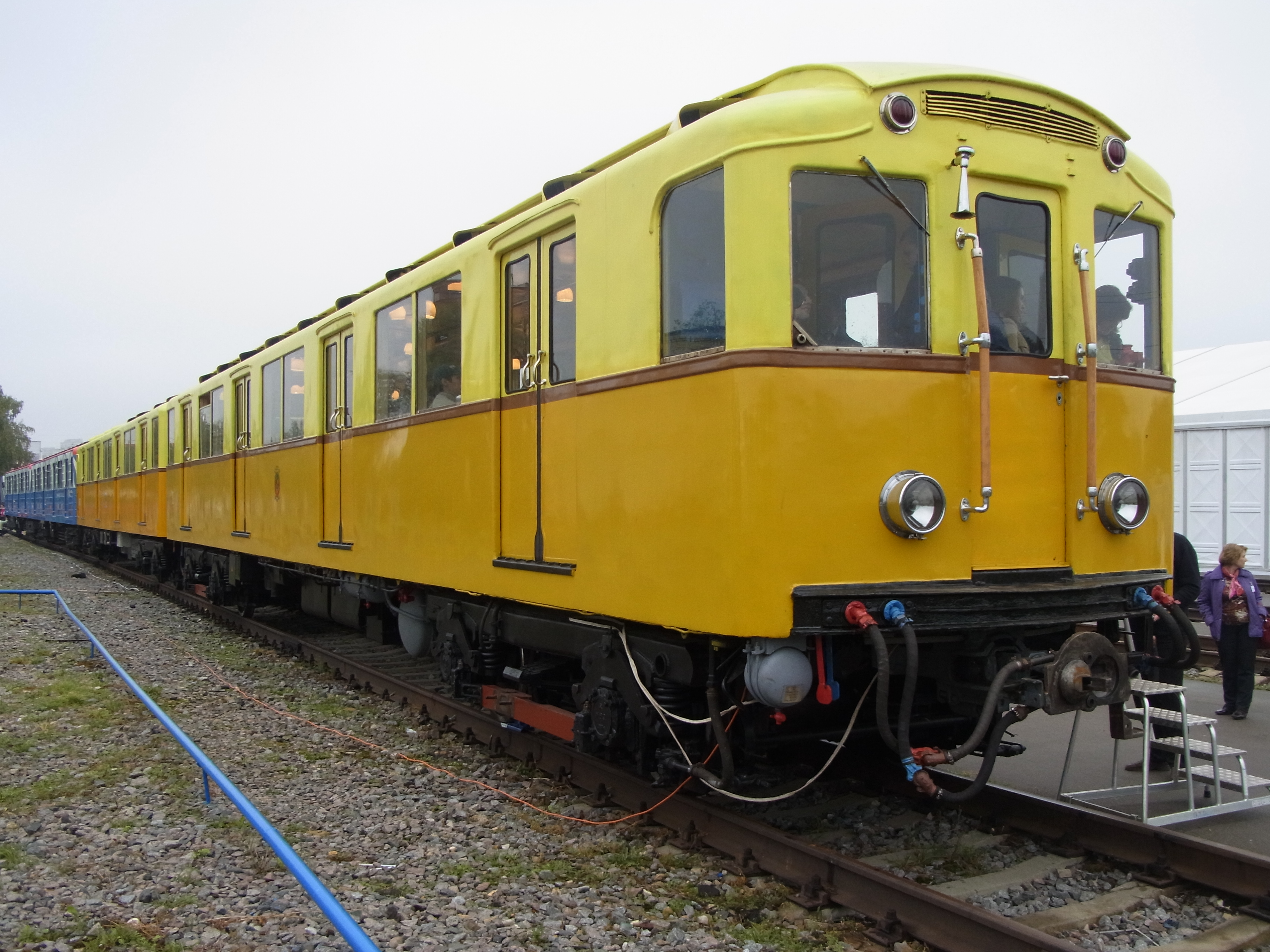 Электропоезд типа А с вагонами 1 и 1031 на ЭКСПО-1520 в Щербинке